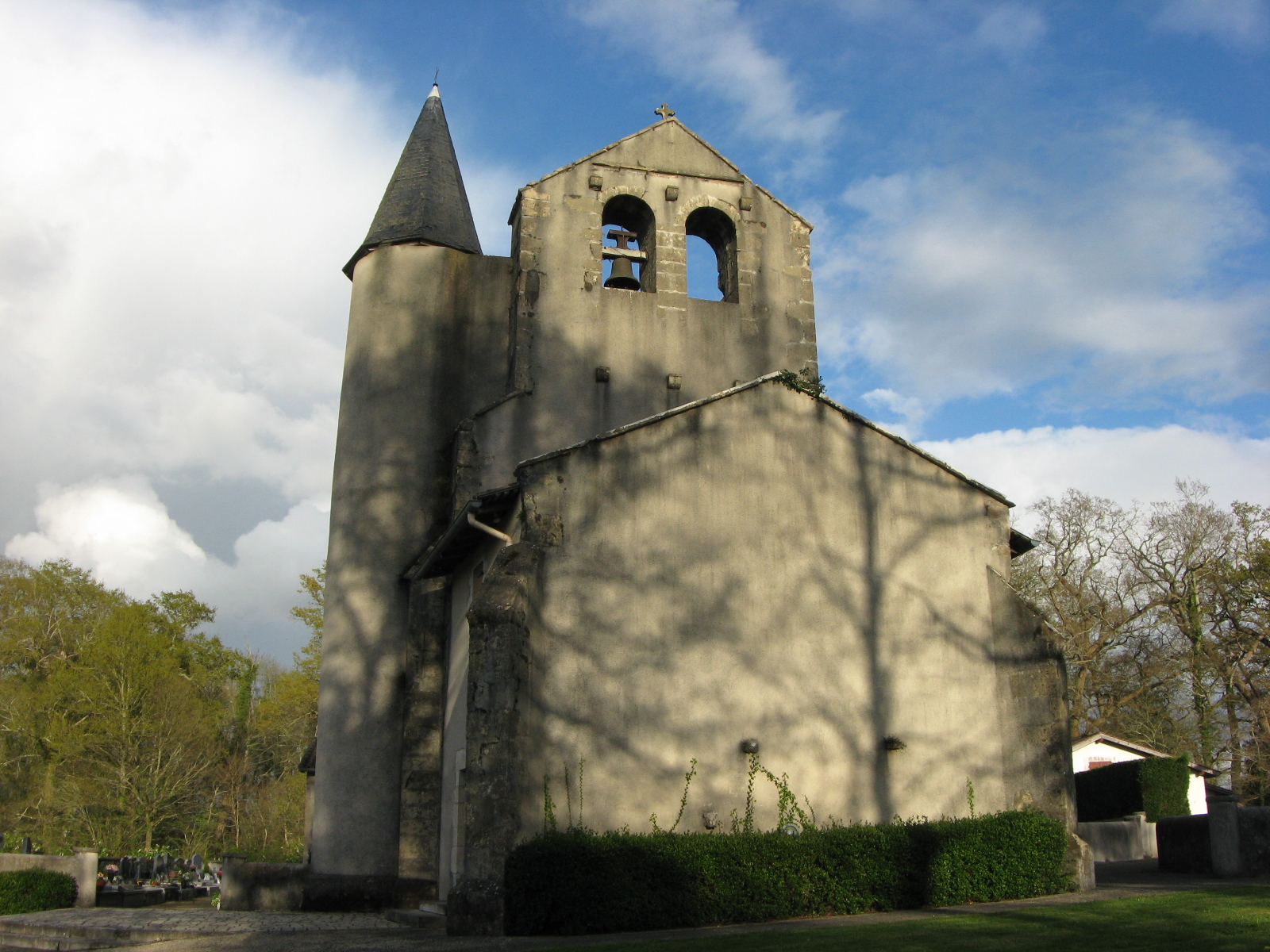 Eglise de Biarrotte (Landes (département)) (Pyrénées).